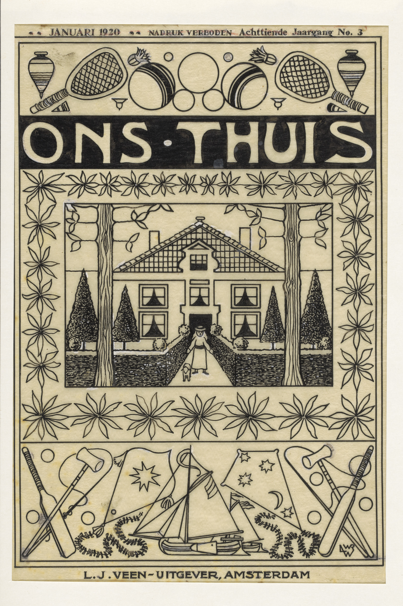 Bandontwerp van Willem Wenckebach voor het tijdschrift Ons Thuis, geïllustreerd Maandschrift voor kinderen van 7-10 jaar, jaargang 18, no. 3, januari 1920